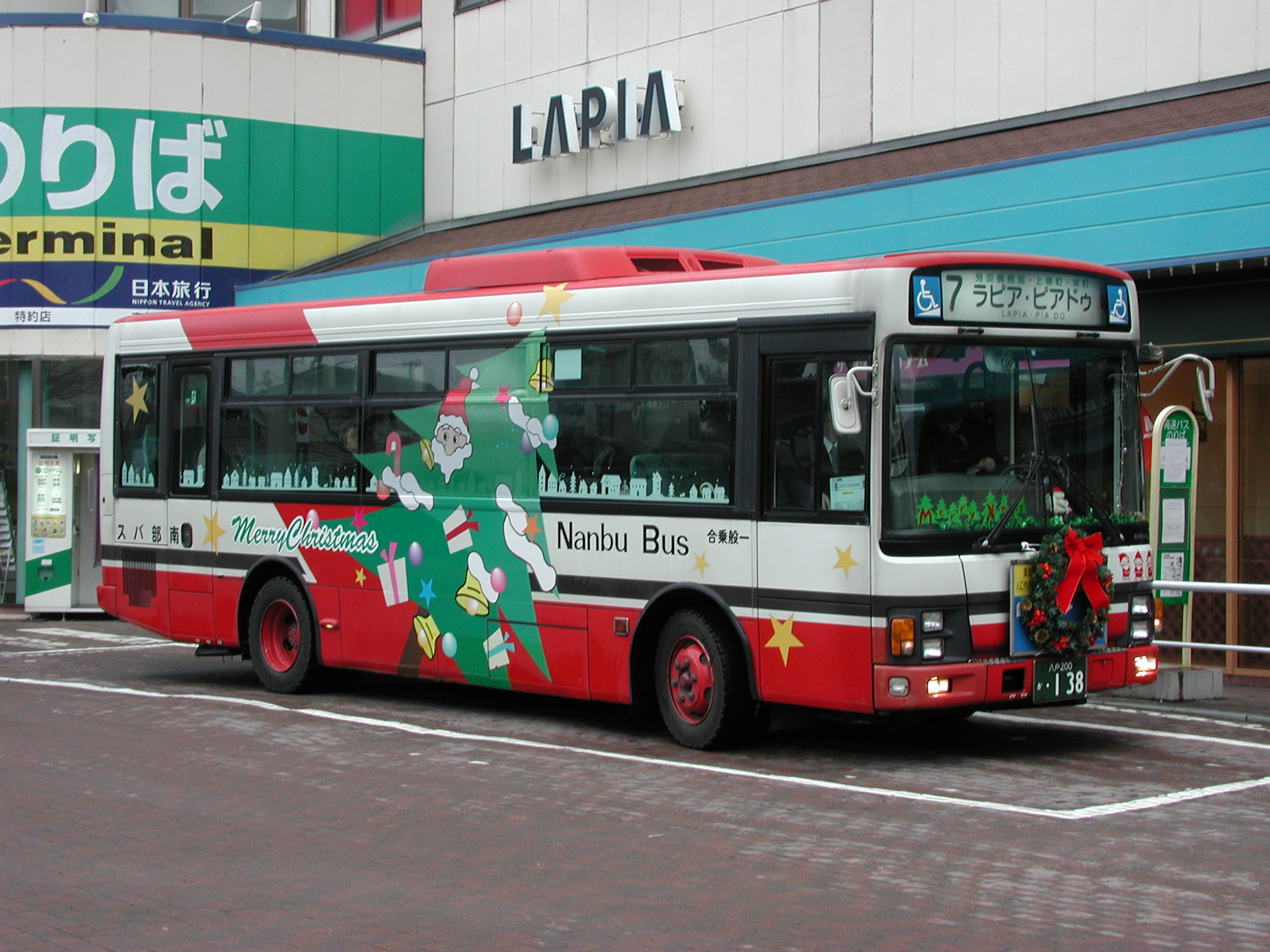 南部バス 岬台団地 - ラピア・ピアドゥ線専用車両＜2008年クリスマス限定装飾Ver.＞（いすゞ・エルガミオ：KK-LR233J1） 八戸ラピアバスターミナルにて